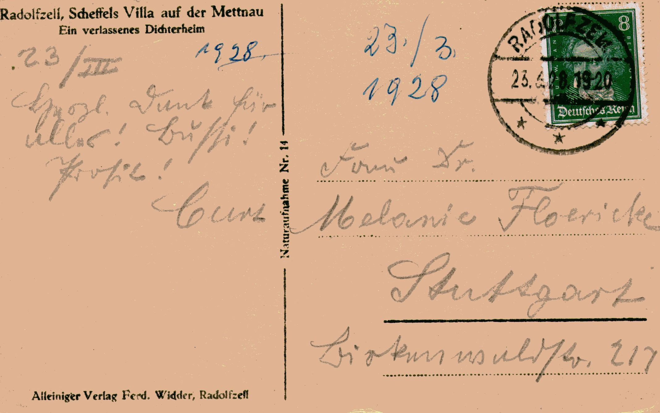 Alte Ansichtskarte: Scheffelhaus, Mettnau, Radolfzell am Bodensee, gelaufen 1928